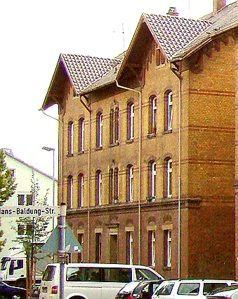 Ausschnitt aus File:Hn-boeck-grossgart23.jpg